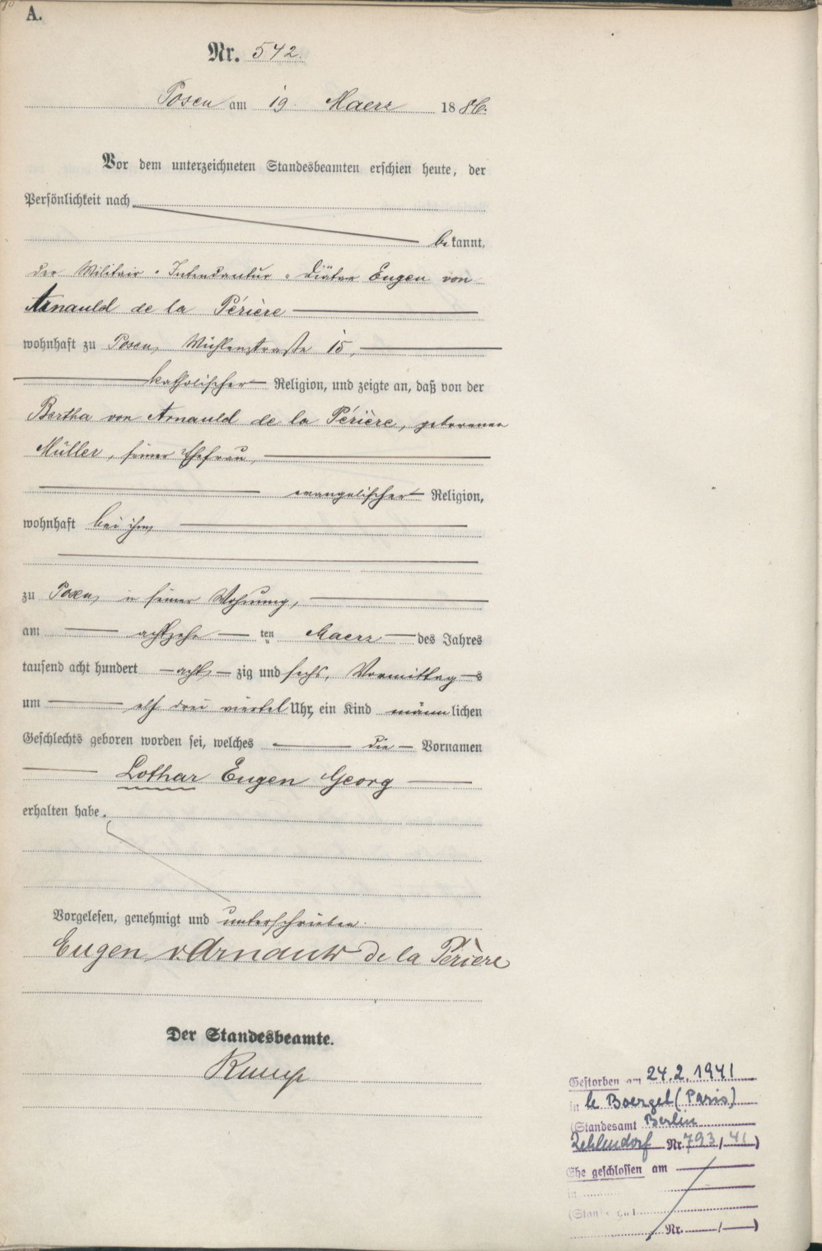 numer 542